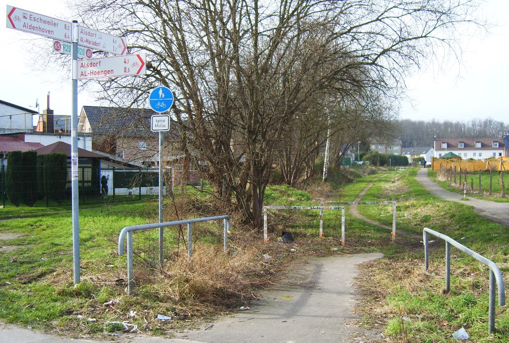 Ehemalige Trasse der Bahnstrecke Aachen-Nord–Jülich an der Jülicher Straße bzw. Am Müschekamp im Alsdorfer Stadtteil Hoengen: heute Radweg